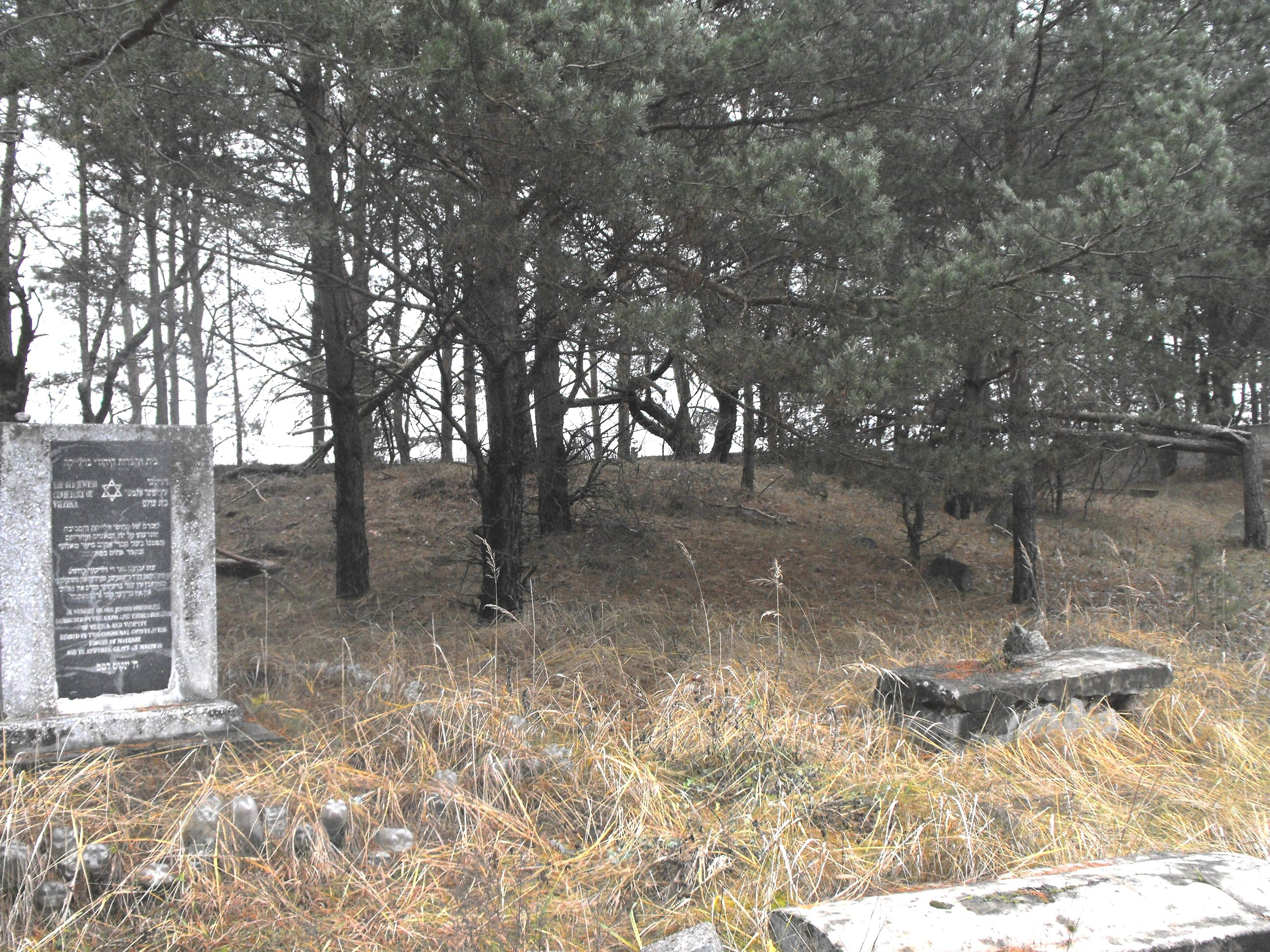 Памятник на еврейском кладбище Вилейки убитым нацистами евреям Вилейского гетто.